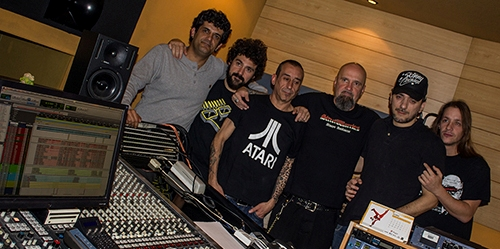 Def Con Dos en el estudio vallecano Oasis de Kosta (de Boikot), con motivo de la grabación de su novedo disco de estudio: España es idiota